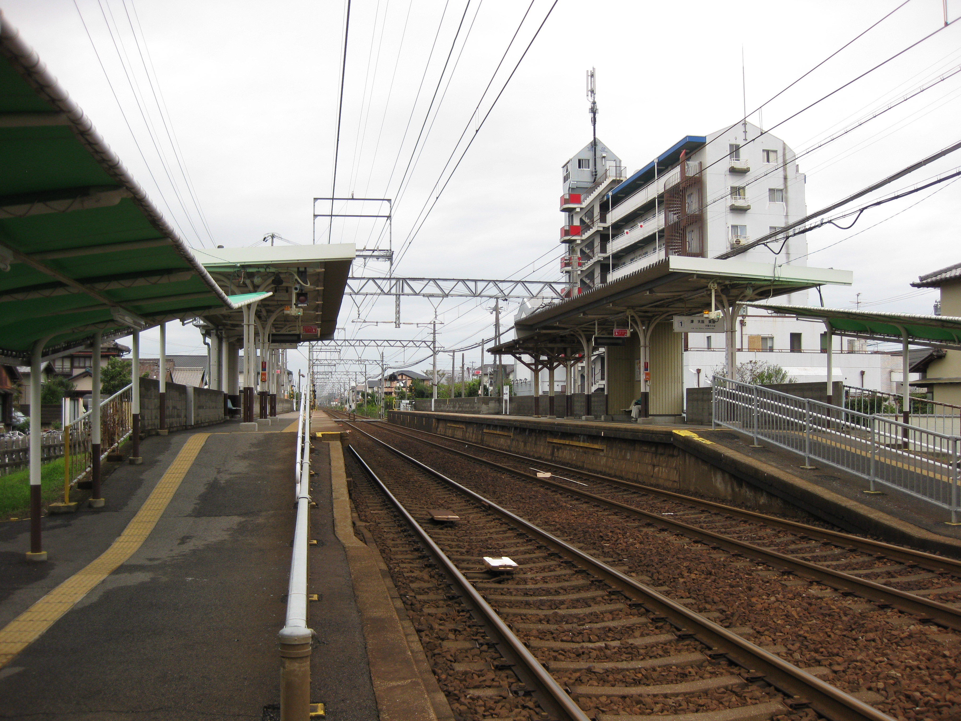 磯山駅プラットホーム